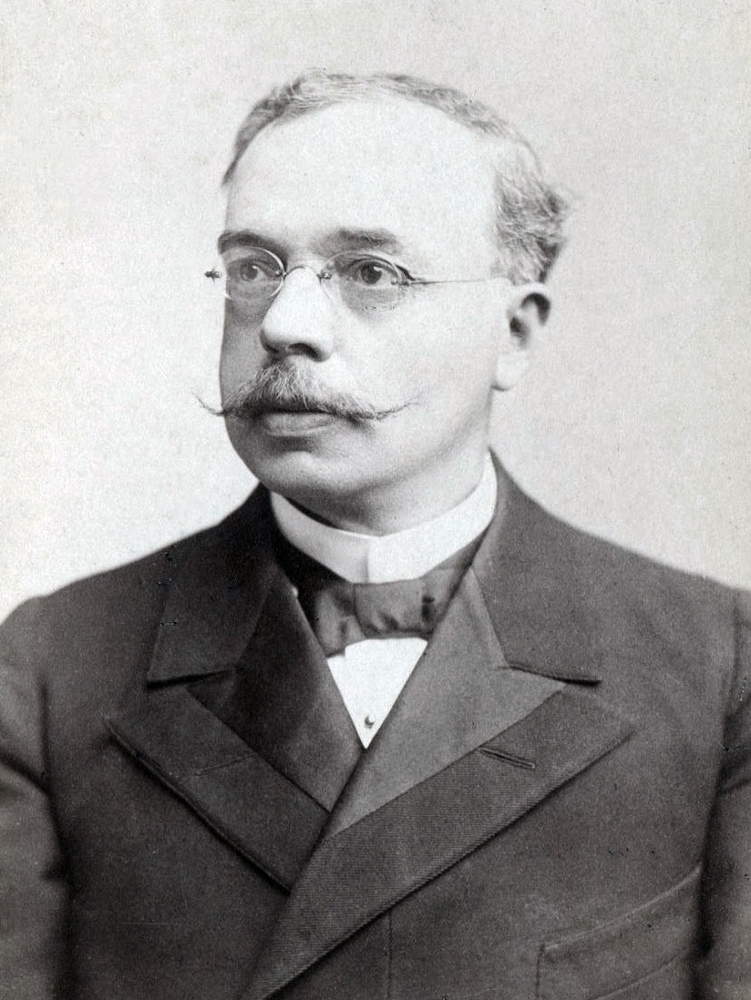 Enrique Mac Iver Rodríguez (n. Constitución; 15 de julio de 1844 - f. Santiago de Chile; 21 de agosto de 1922), abogado, político y hombre de Estado chileno.